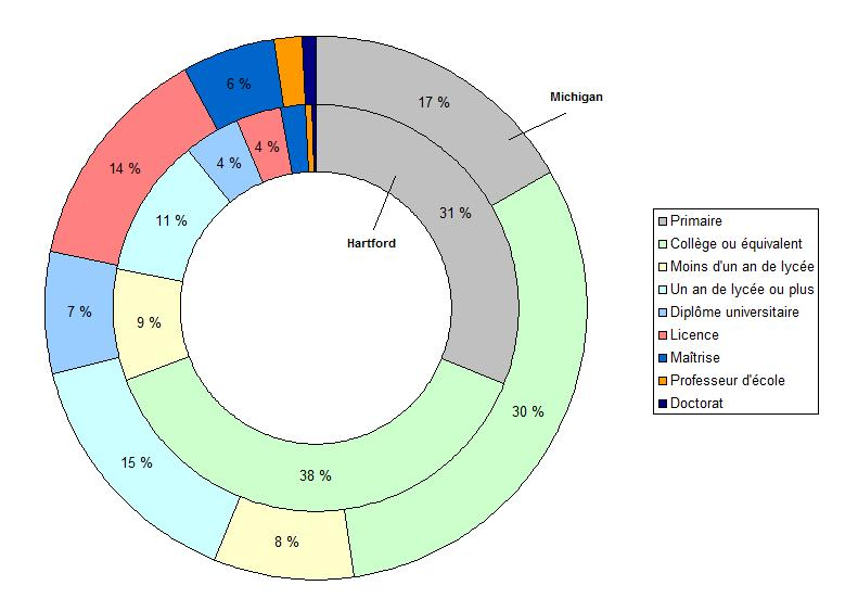 Niveau d'études de la population, à Hartford (Michigan) et dans l'Etat du Michigan (Etats-Unis).